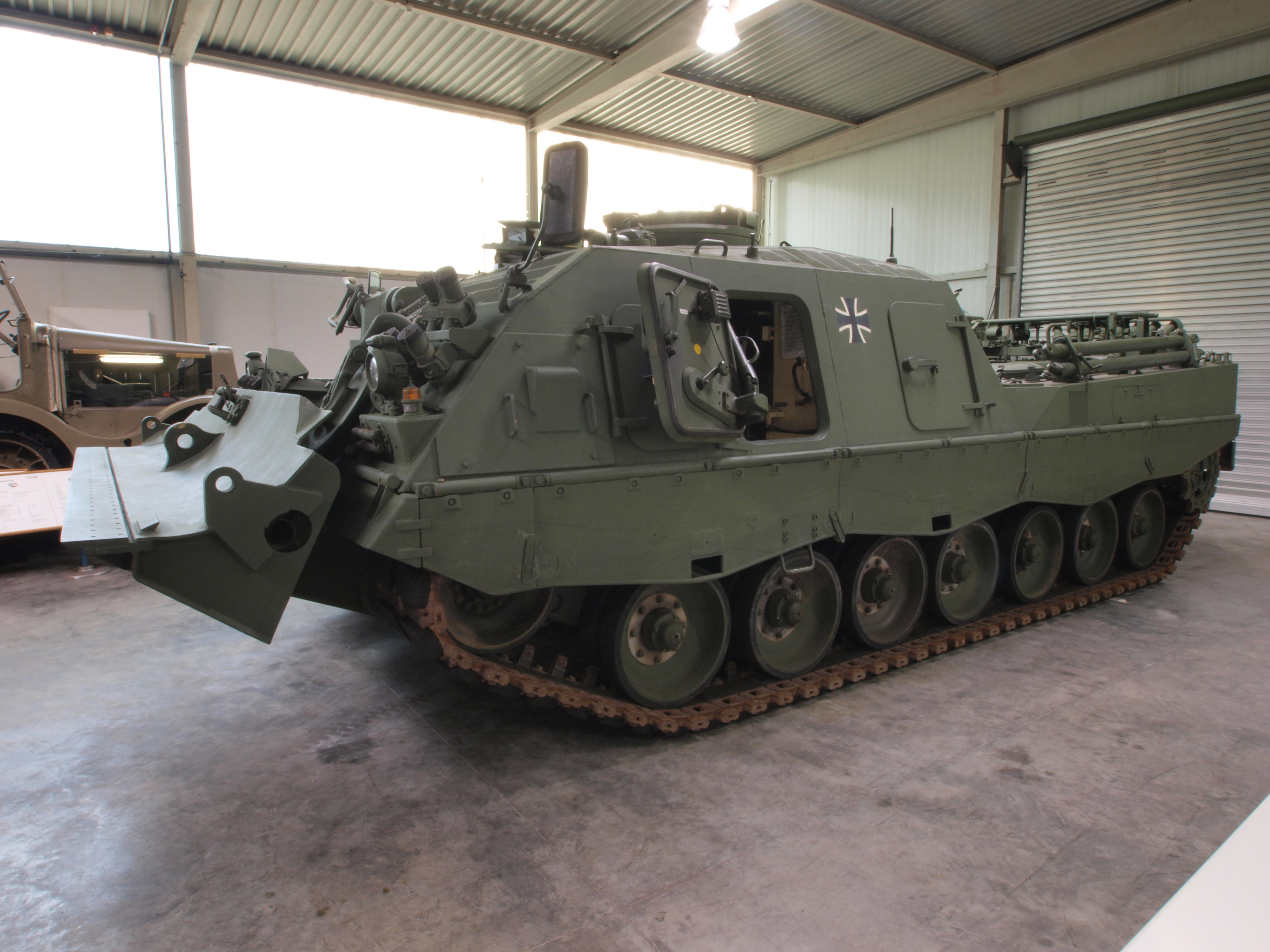 Bergepazer 3 Buffel